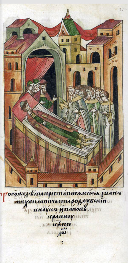 ЛИЦЕВОЙ ЛЕТОПИСНЫЙ СВОД В том же году преставился князь Иван Михайлович Стародубский, внук Иванов, правнук Все[во]лодов.